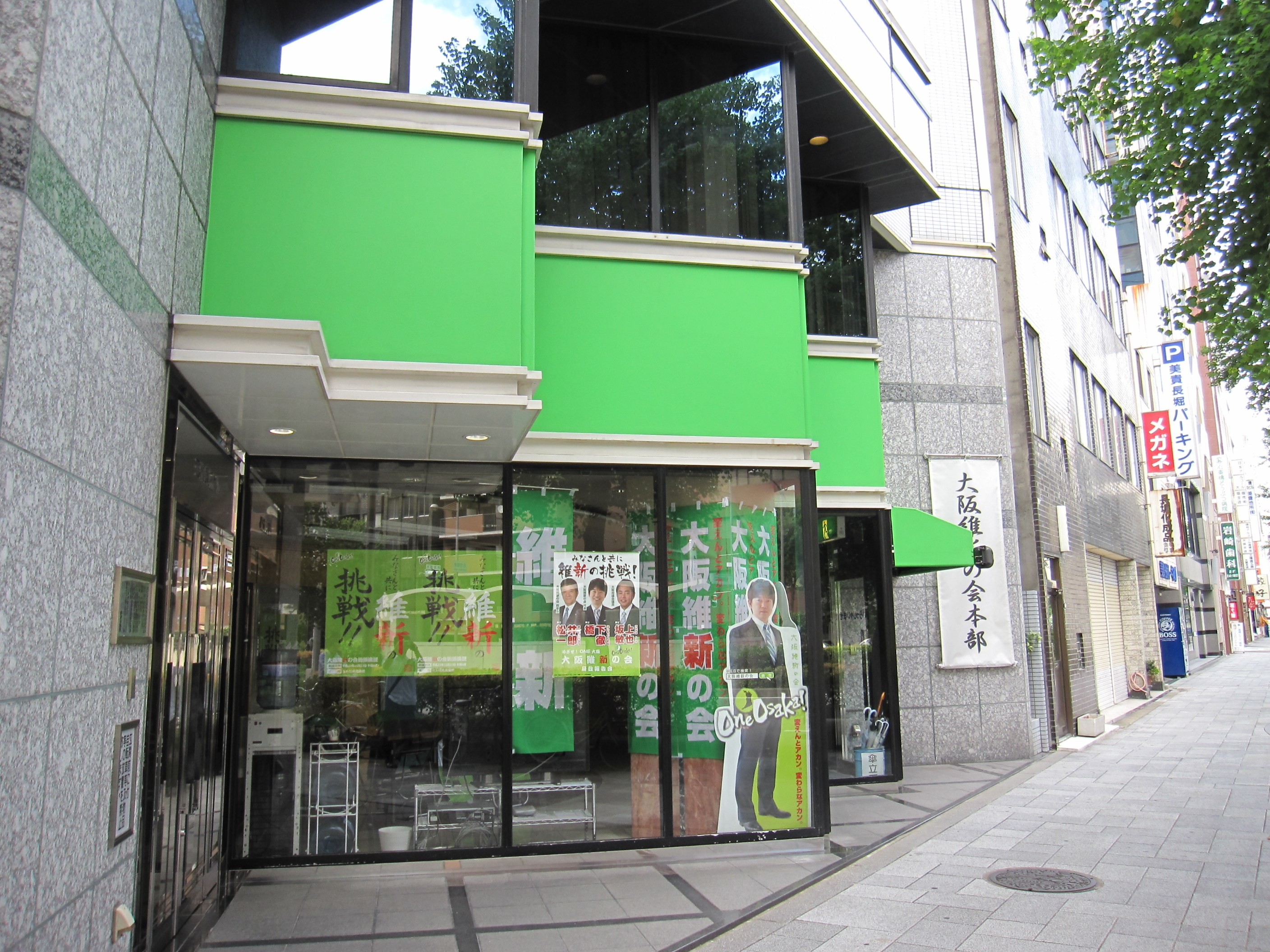 大阪維新の会本部